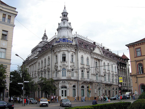 A kolozsvári New York-palota (jelenleg Continental-szálló), Pasztilla jóvoltából és engedélyével